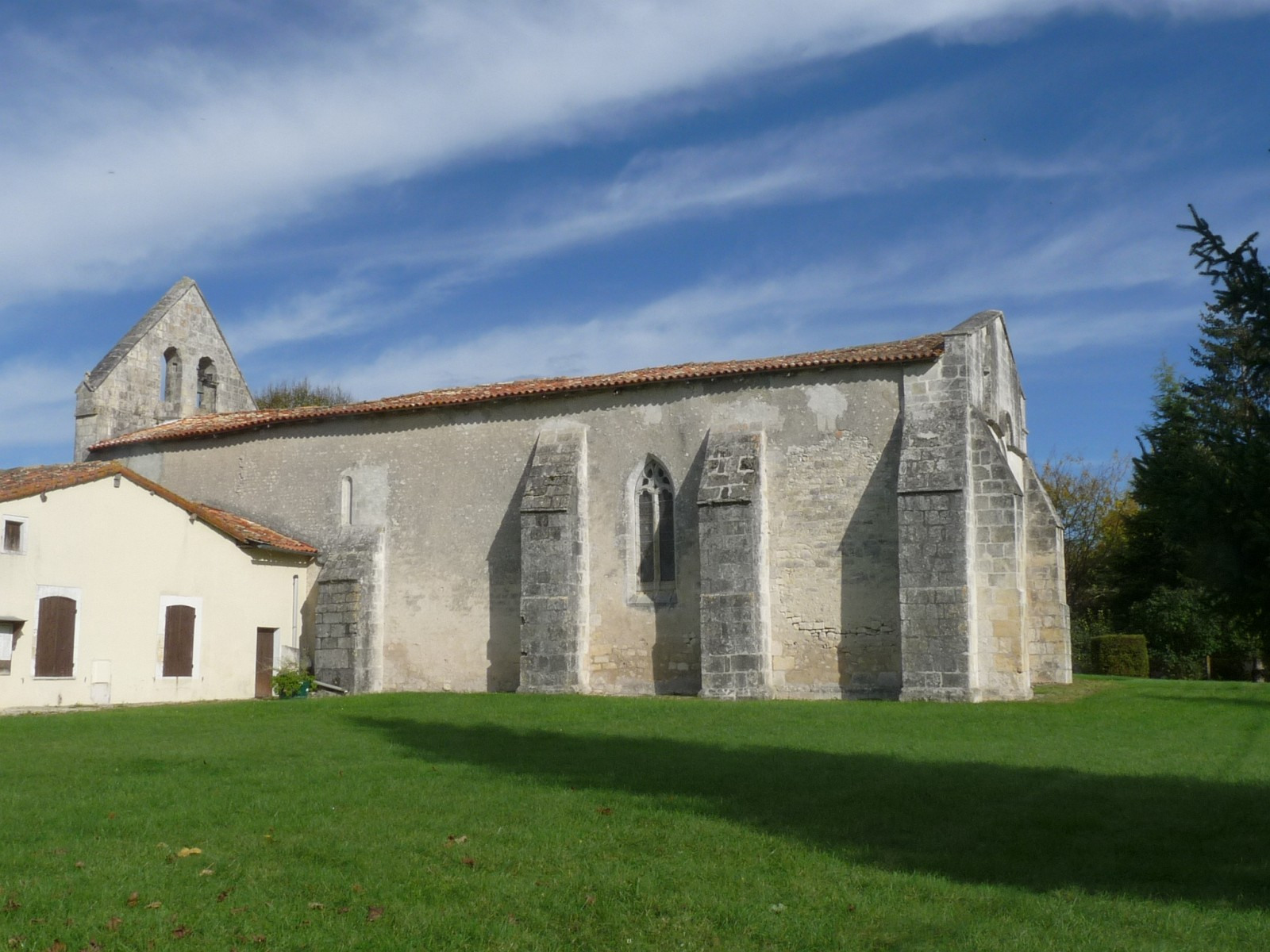 Eglise de St-Médard, Charente-Maritime, France